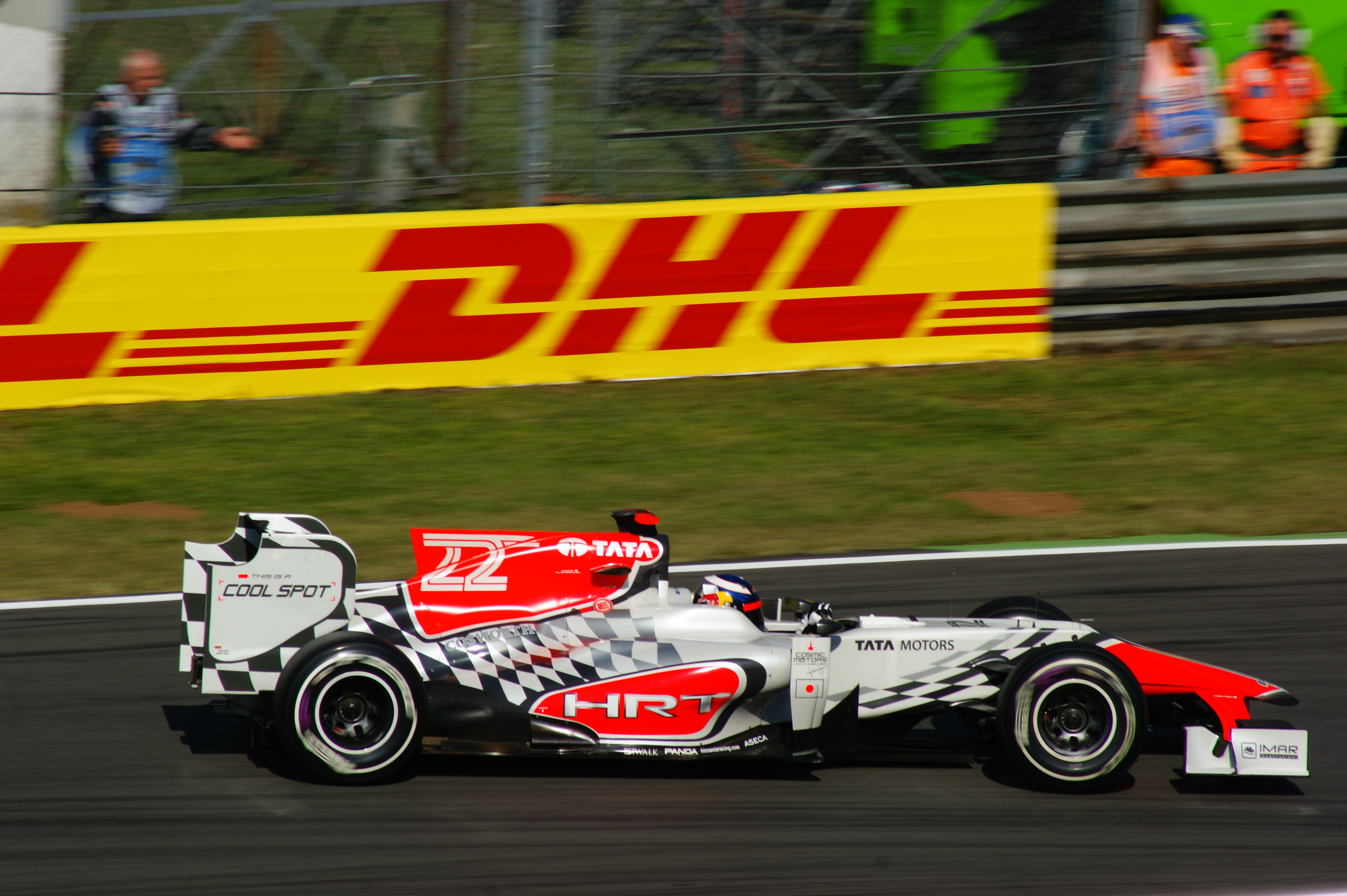 Daniel Ricciardo alla prima variante Monza 2011